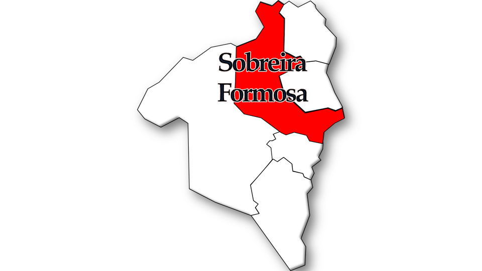 População